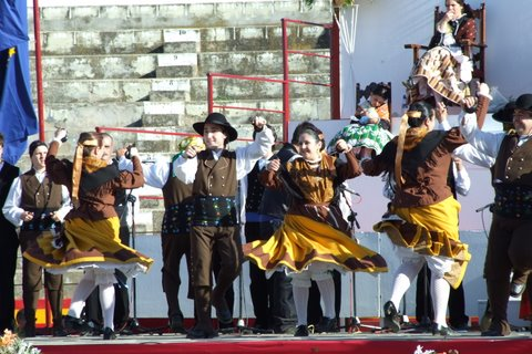 Festival de Mayos en Pedro Muñoz